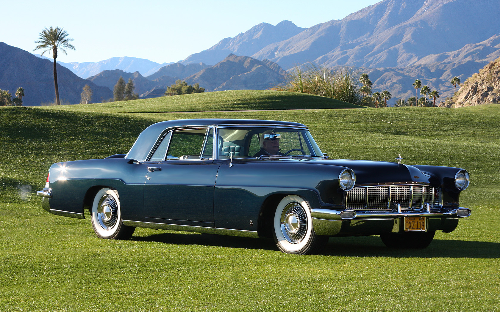 2011 Desert Classic, La Quinta, CA